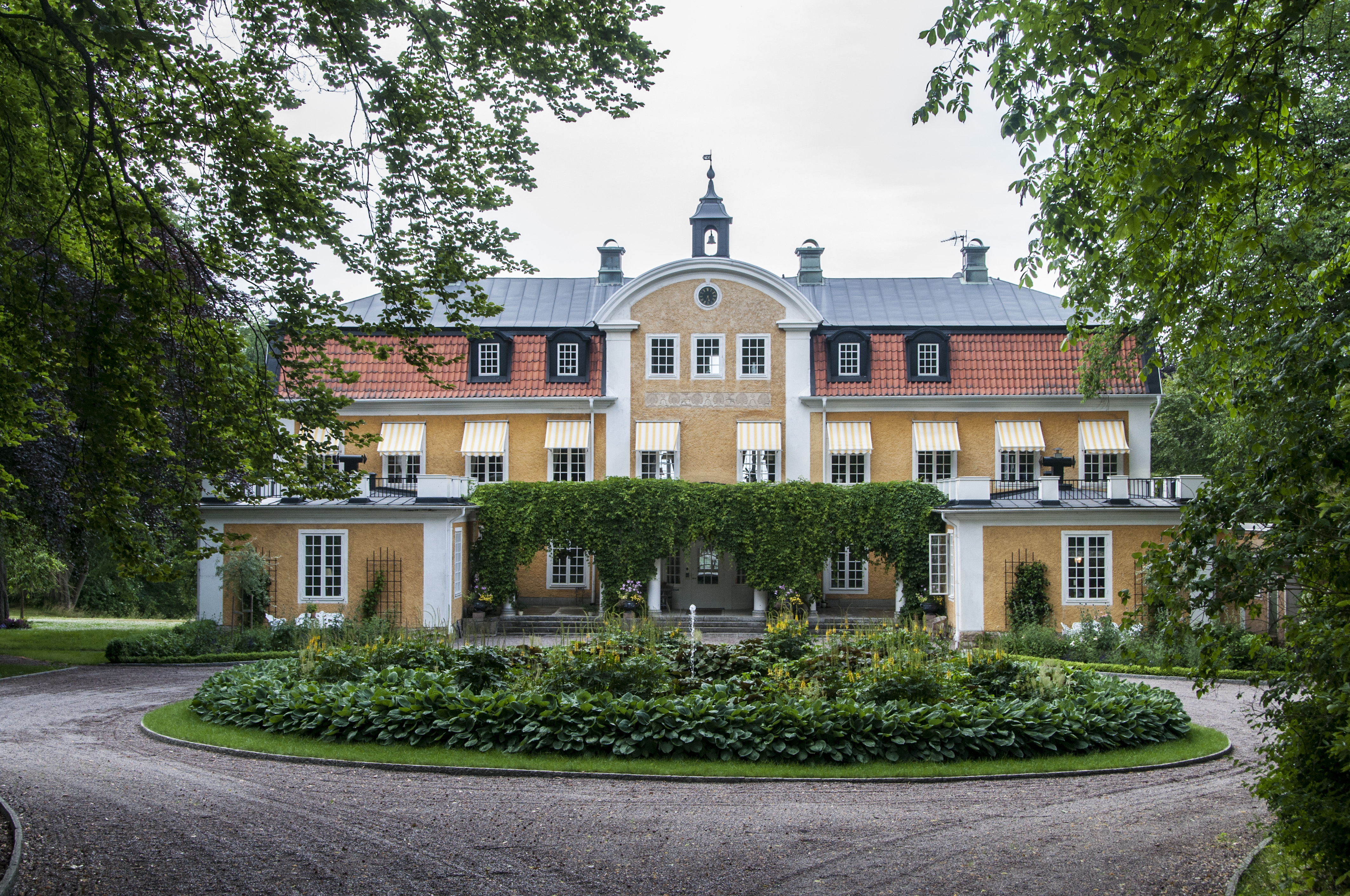 Råbäcks säteri. Fick sitt nuvarande utseende genom Carl Wilhelm Klingspors ombyggnad 1918, enligt professor Isak Gustaf Clasons ritningar.